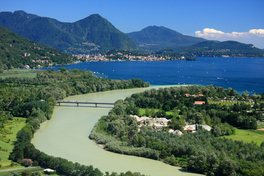 La foce del fiume Toce nel lago Maggiore vista da Montorfano, frazione di Mergozzo (VB)